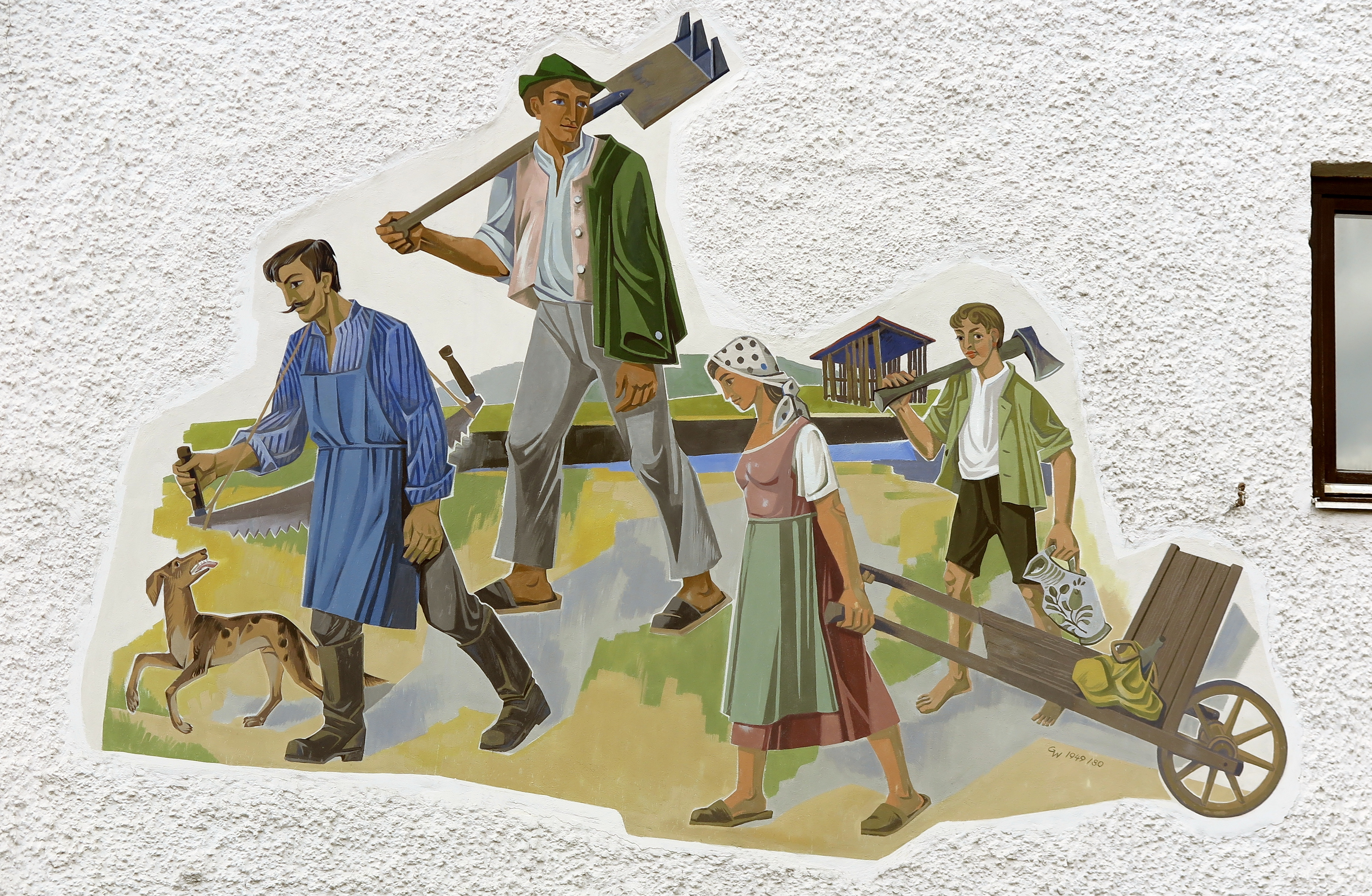 Deutschland, Bayern, Oberbayern, Landkreis Fürstenfeldbruck, Gemeinde Gröbenzell, Lüftlmalerei an der ehemaligen Bahnhofsapotheke, Künstler G.W. aus dem Jahre 1948, offensichtlich 1980 restauriert. Abriß des Gebäudes im Herbst 2019